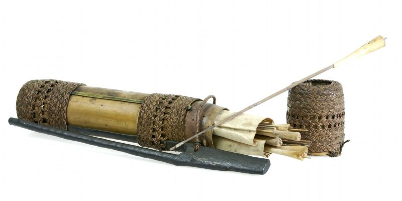 Pijlkoker. In de koker zitten een papieren stop en 29 pijlen.. Bamboe koker met blaasroerpijltjes een stop en een gordelhaak